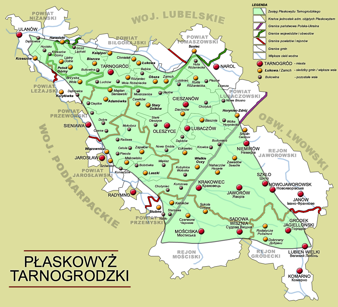 Mapa, Płaskowyż Tarnogrodzki, mezoregion fizycznogeograficzny w Kotlinie Sandomierskiej, Polska i Ukraina (Map of Tarnogród Plateau, a physico-geographical mezoregion within Sandomierz Lowland, Poland & Ukraine)